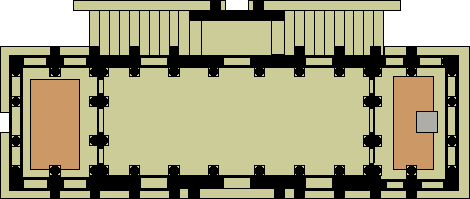 Planta de Santa María del Naranco. Oviedo, Asturias (España).